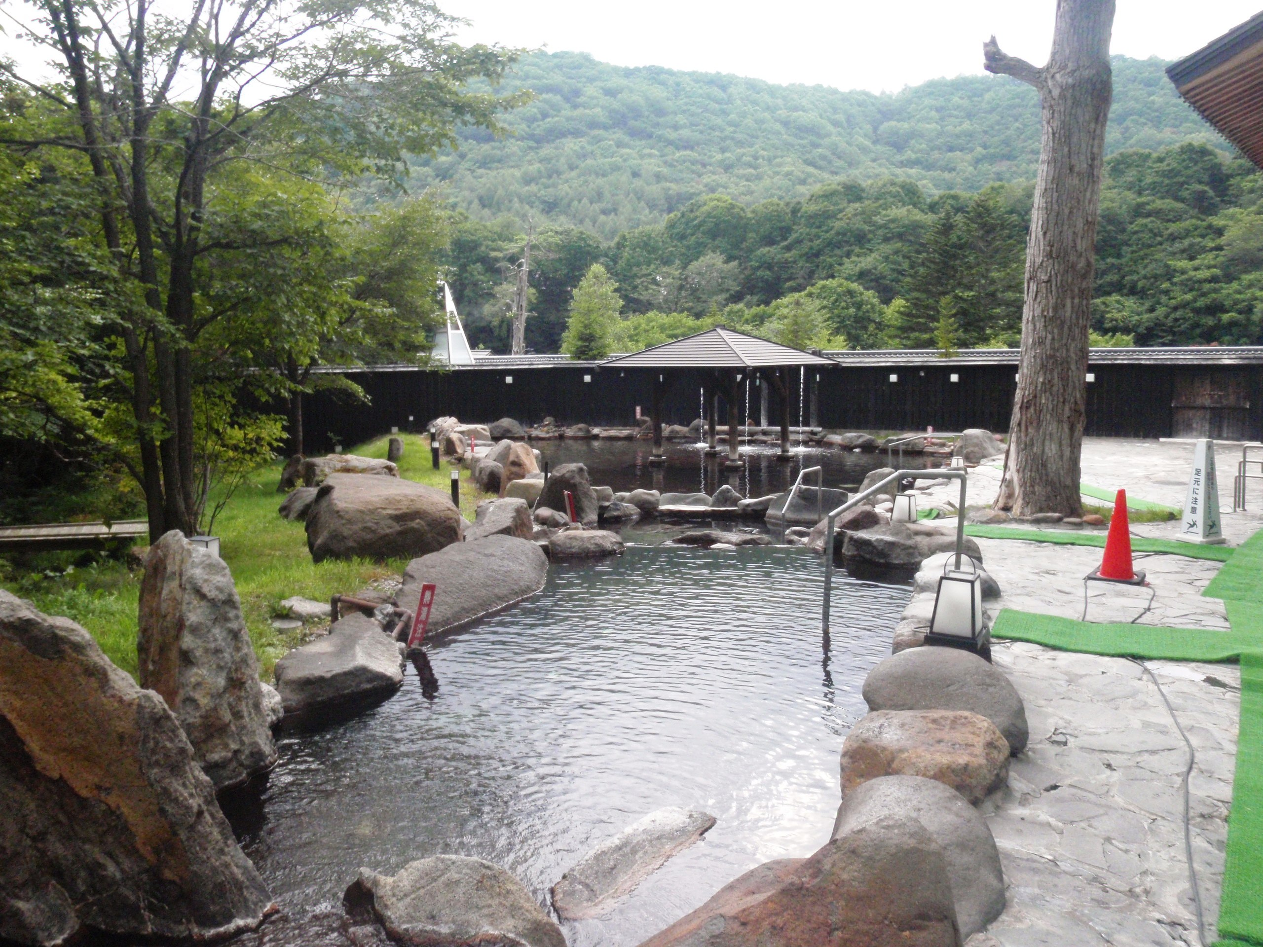 北湯沢温泉、湯元 名水亭、露天風呂